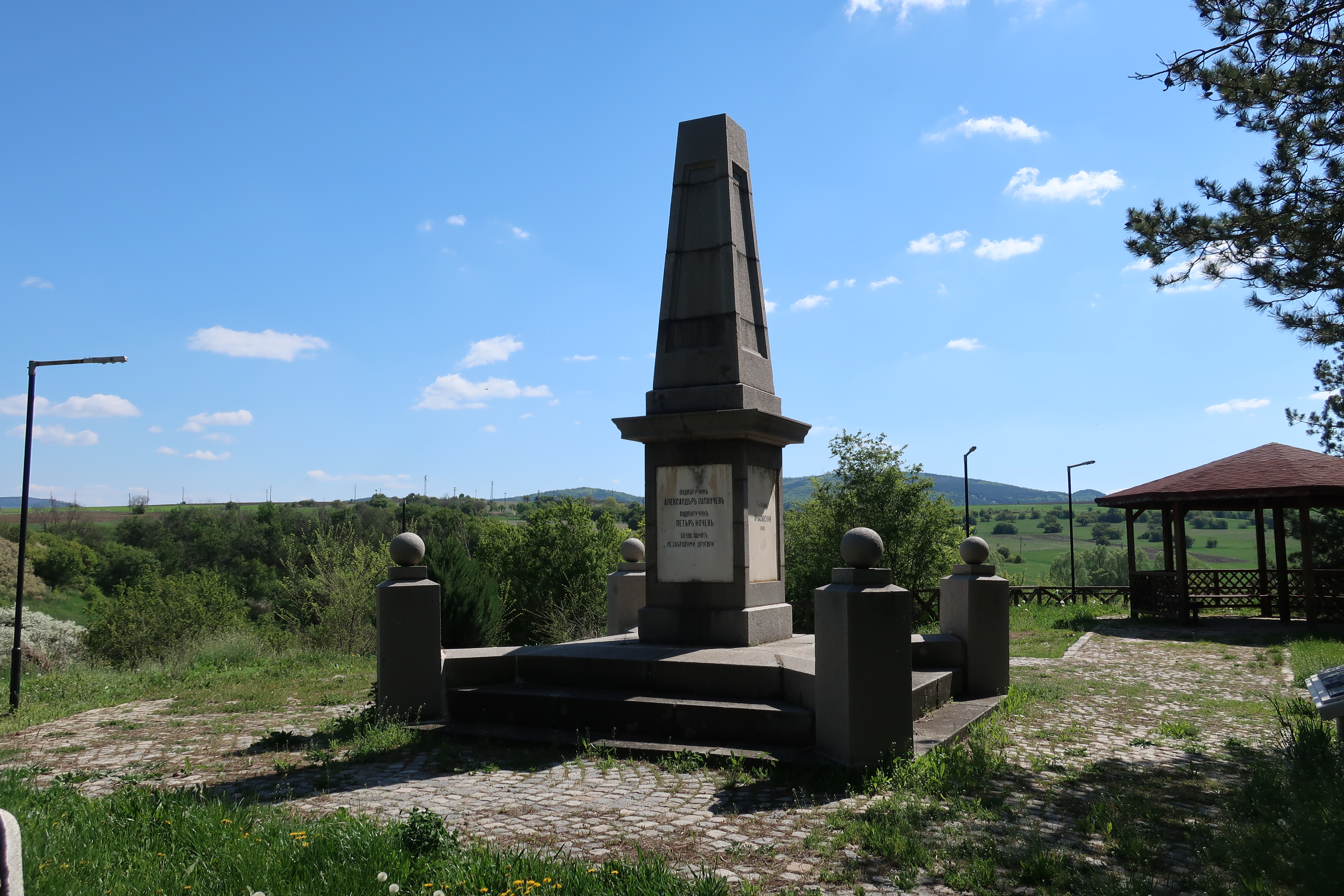 Първия войнишки пометник в България намиращ се в с. Алдомиповци